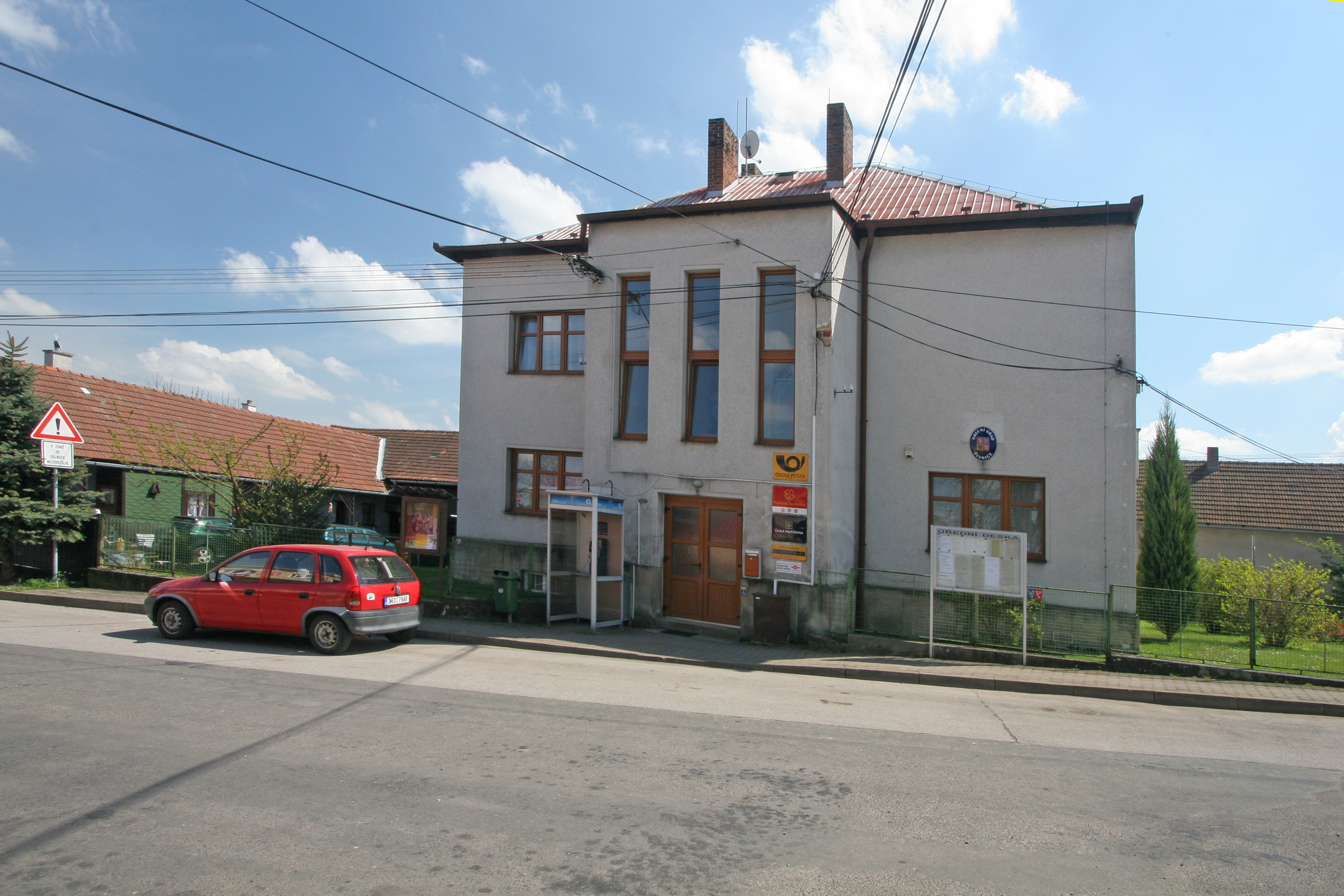 Žlunice obecní úřad a pošta